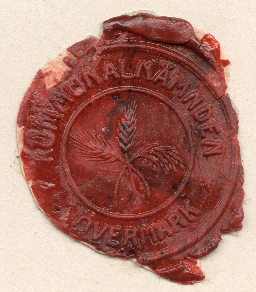 Ylimarkun kunnanhallituksen vanha sinetti.